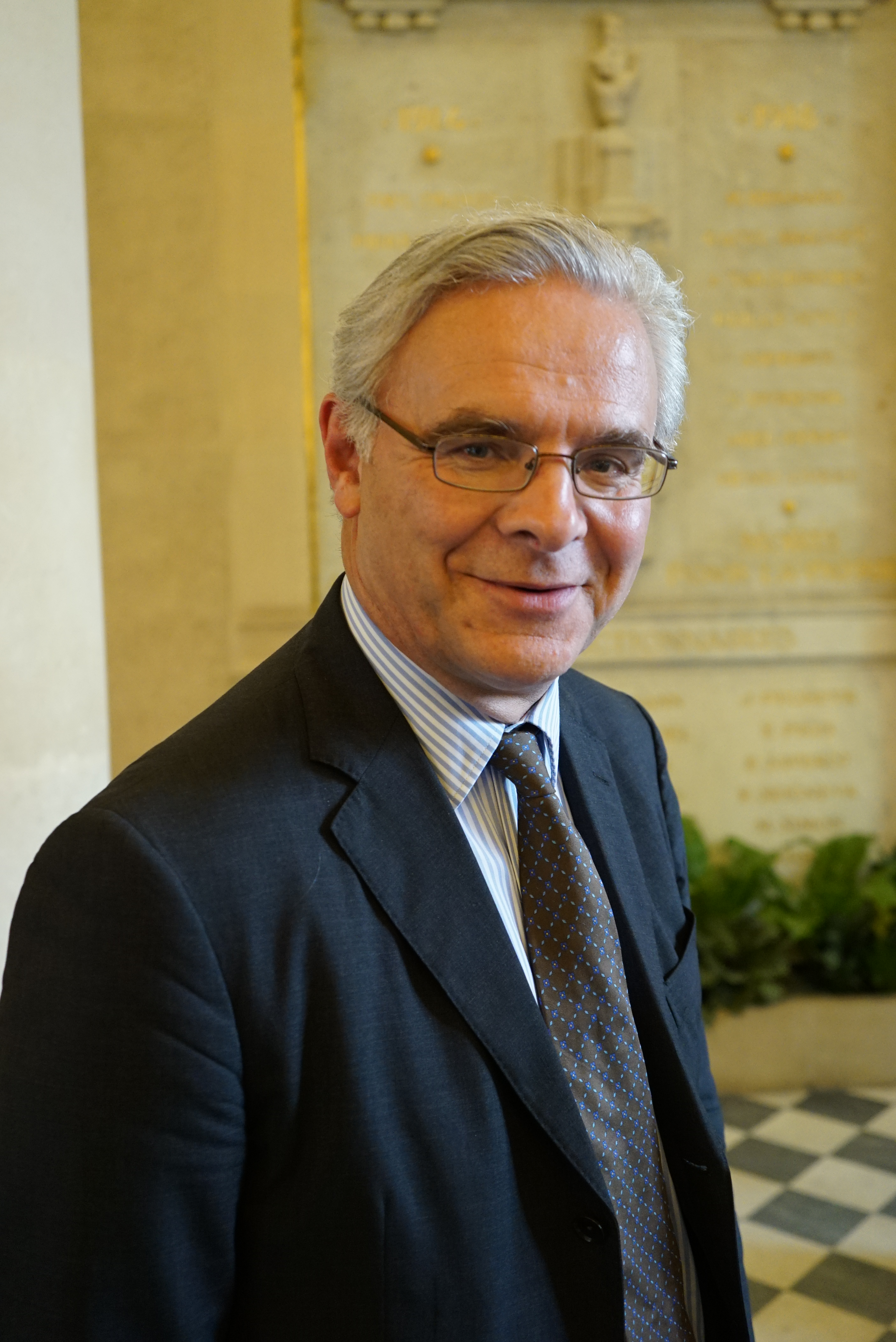 le député dans la salle des quatre colonnes.